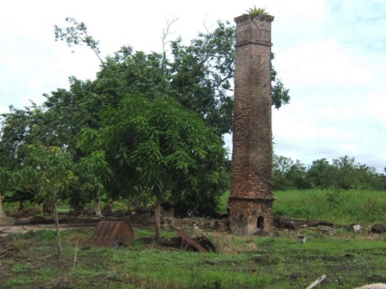 funderingsrestanten van een oude cacaoloods met verwarmde vloer en bakstenen schoorsteen.